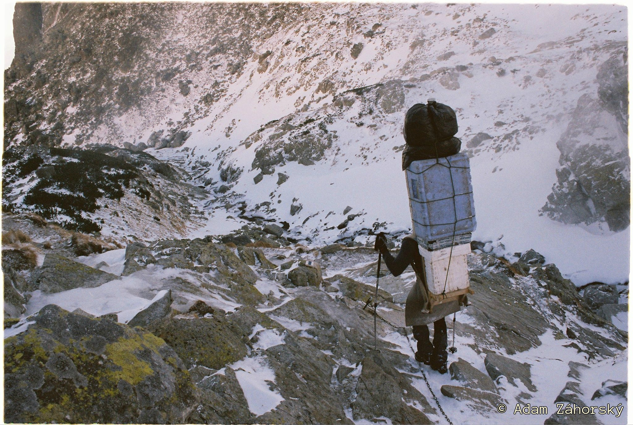 Tatranský vysokohorský nosič zachytený pri zostupe zo Zbojníckej chaty v Malej studenej doline.